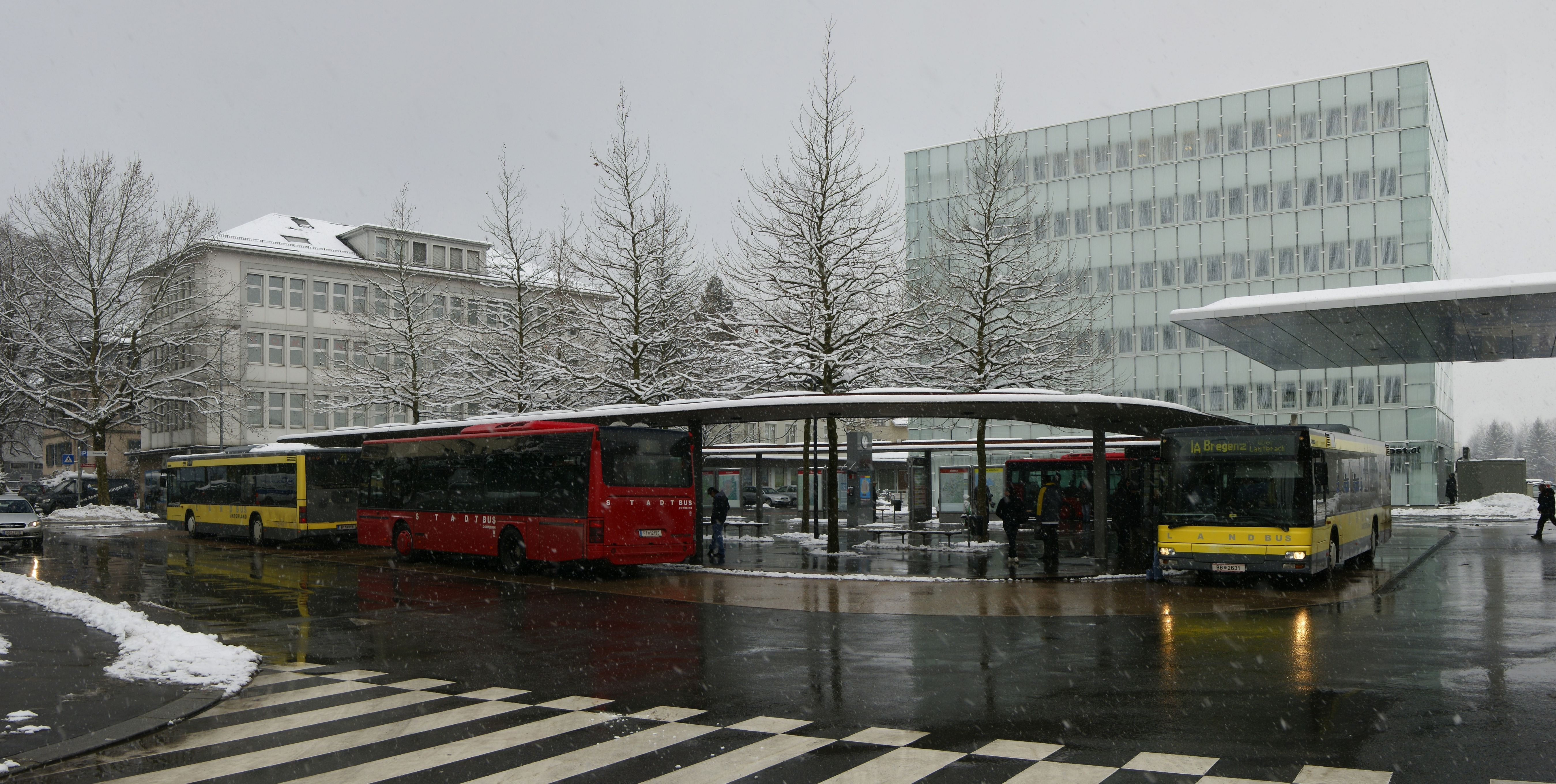 Busbahnhof Dornbirn, in Vorarlberg. Im Bild Busse des Stadtbus Dornbirn und des Landbus Unterland.